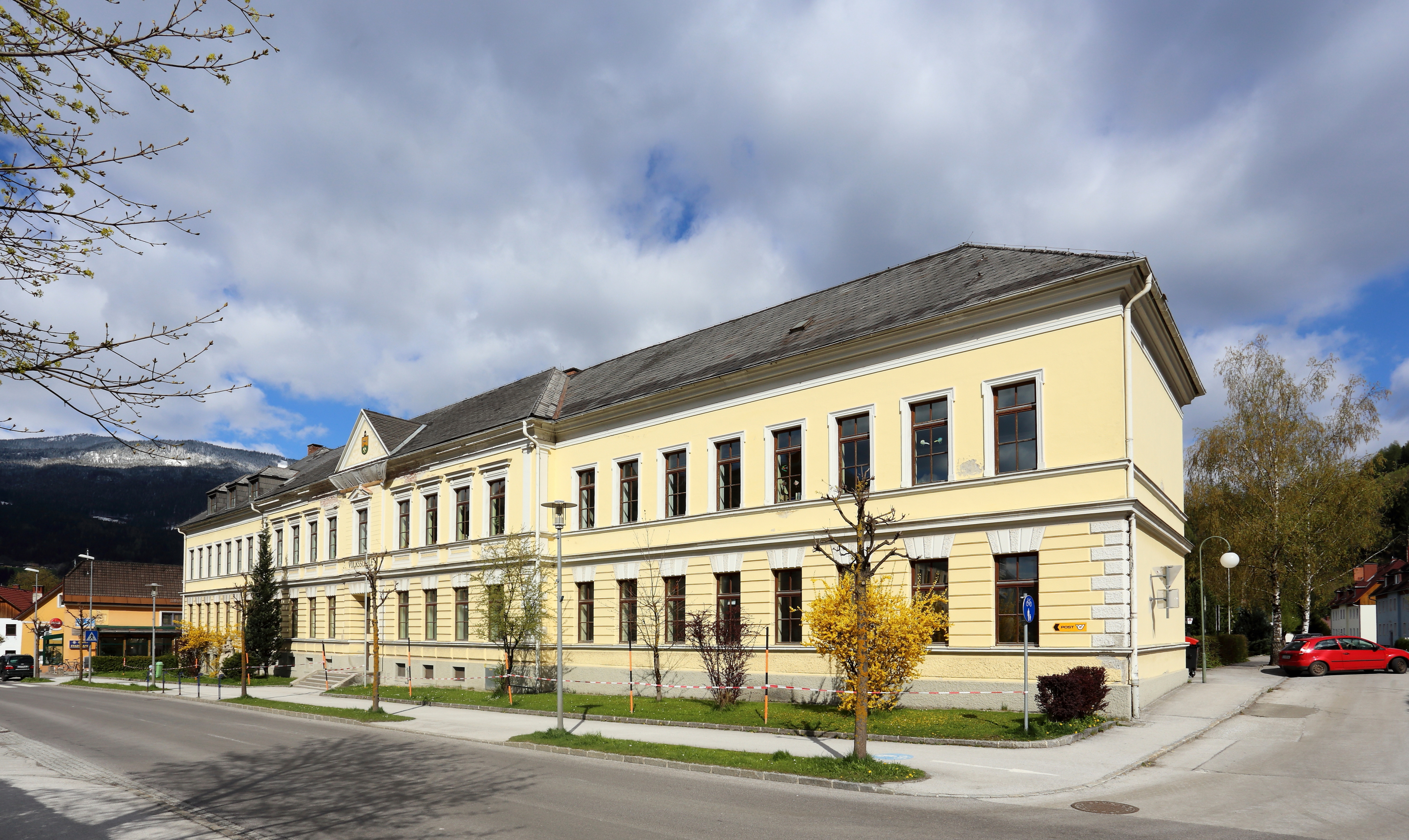 Denkmalgeschützte Volksschule in der steiermärkischen Stadt Trieben.